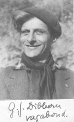 George Dibbern Portrait